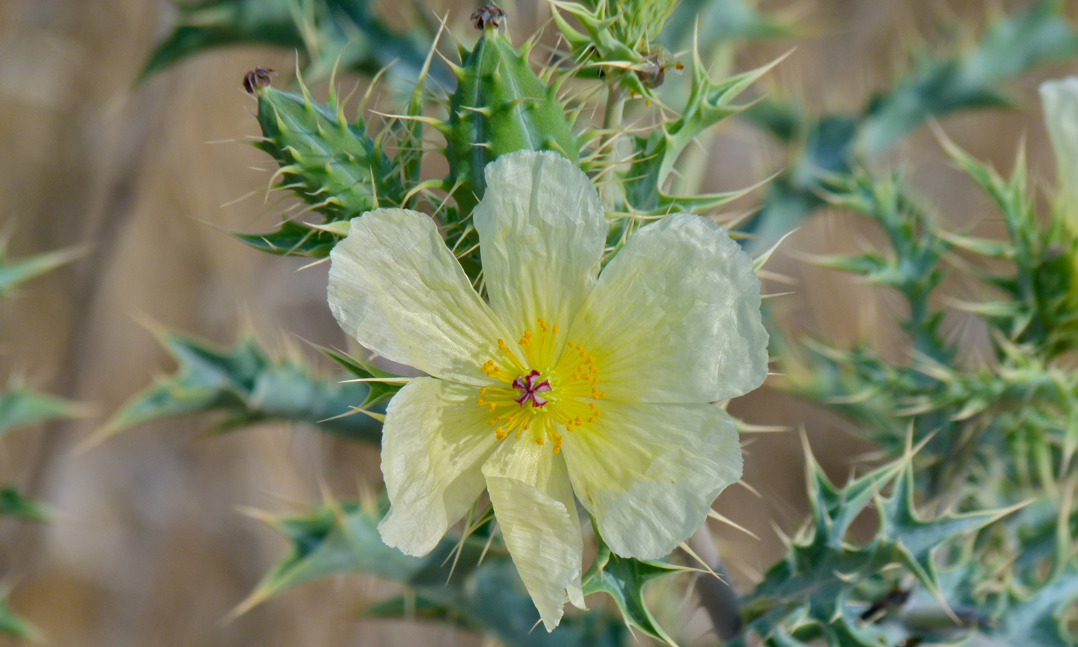 Auob Riverbed, Kgalagadi Transfrontier Park, SOUTH AFRICA